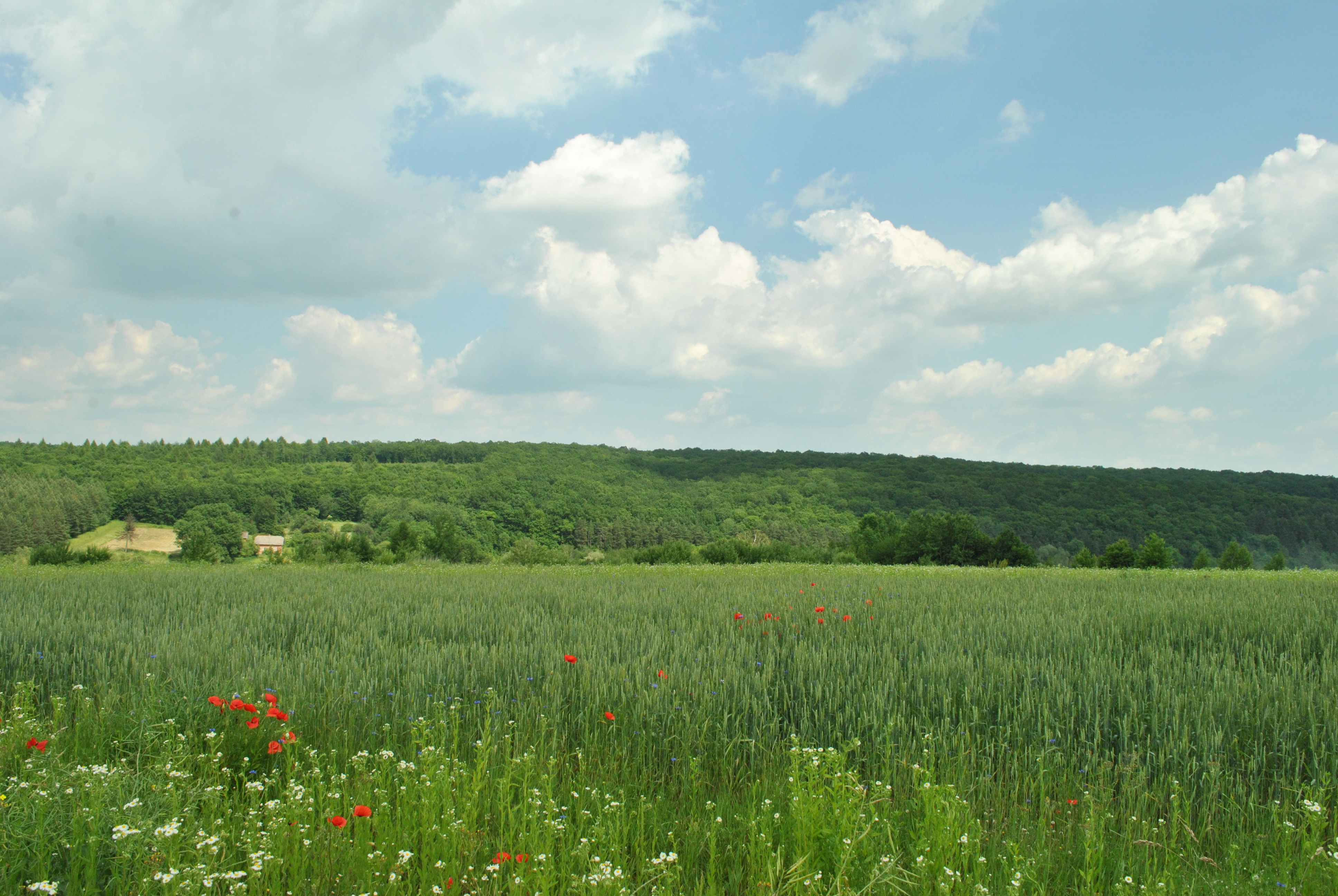 Загальнозоологічний заказник «Савинське», поблизу сіл Бариш і Зубрець Бучацького району в лісовому урочищі «Савинське» у кварталах 10–15 Золотопотіцького лісництва.